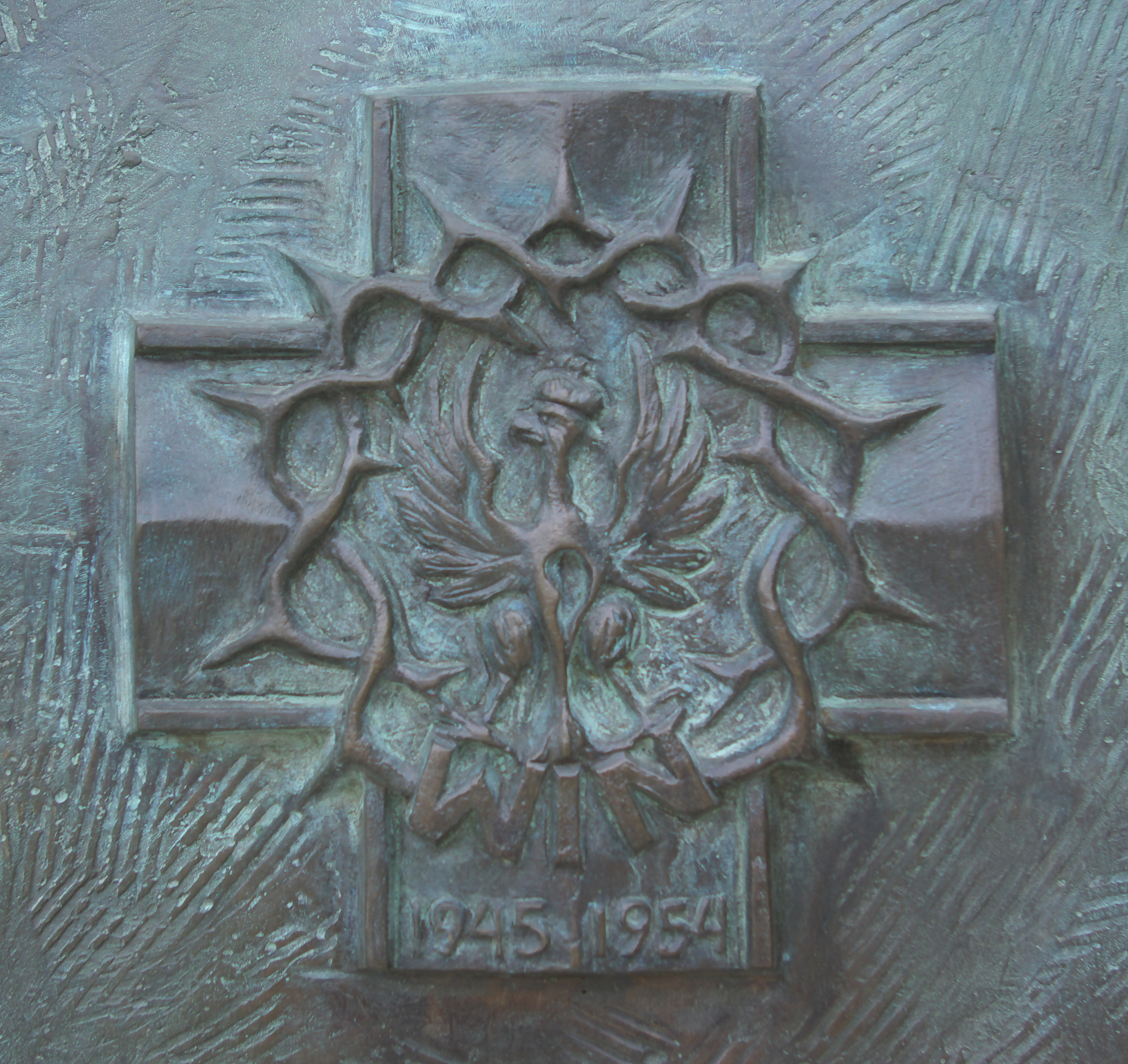 Pomnik Żołnierzy Wyklętych w Rzeszowie przy Alei Łukasza Cieplińskiego. Upamiętniony Łukasz Ciepliński